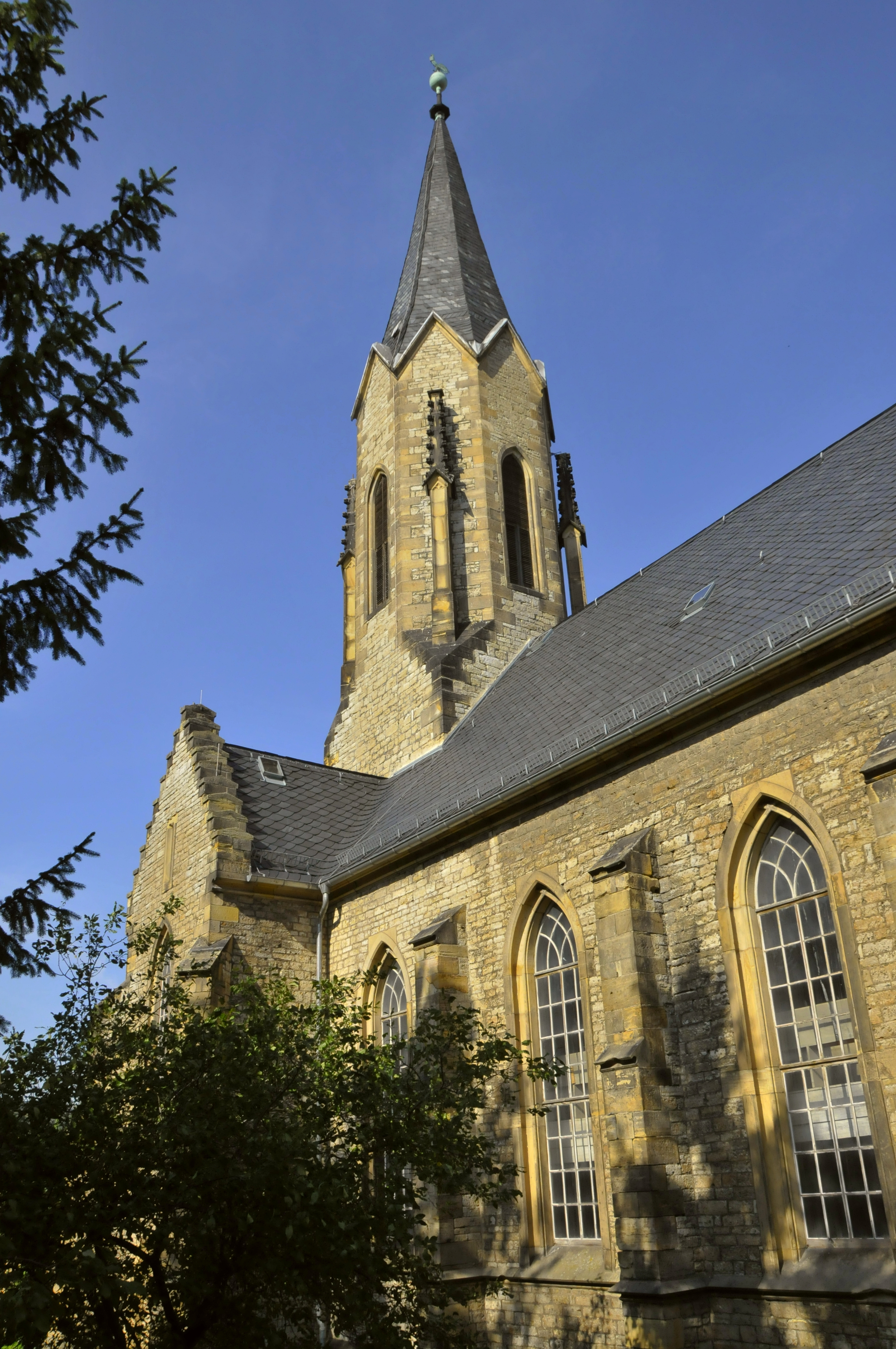 Kleinfahner, Kirche